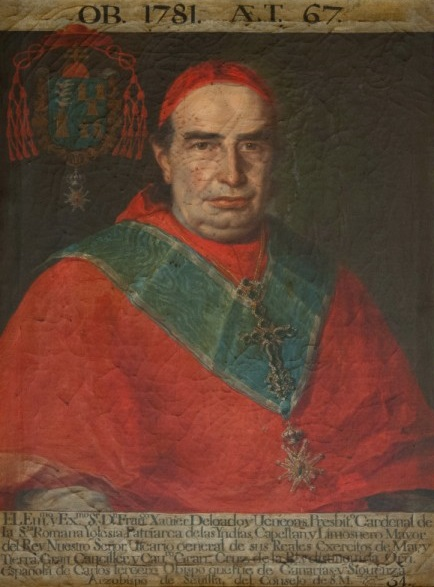 Retrato a óleo del cardenal Francisco Javier Delgado Venegas , que fue arzobispo de Sevilla.